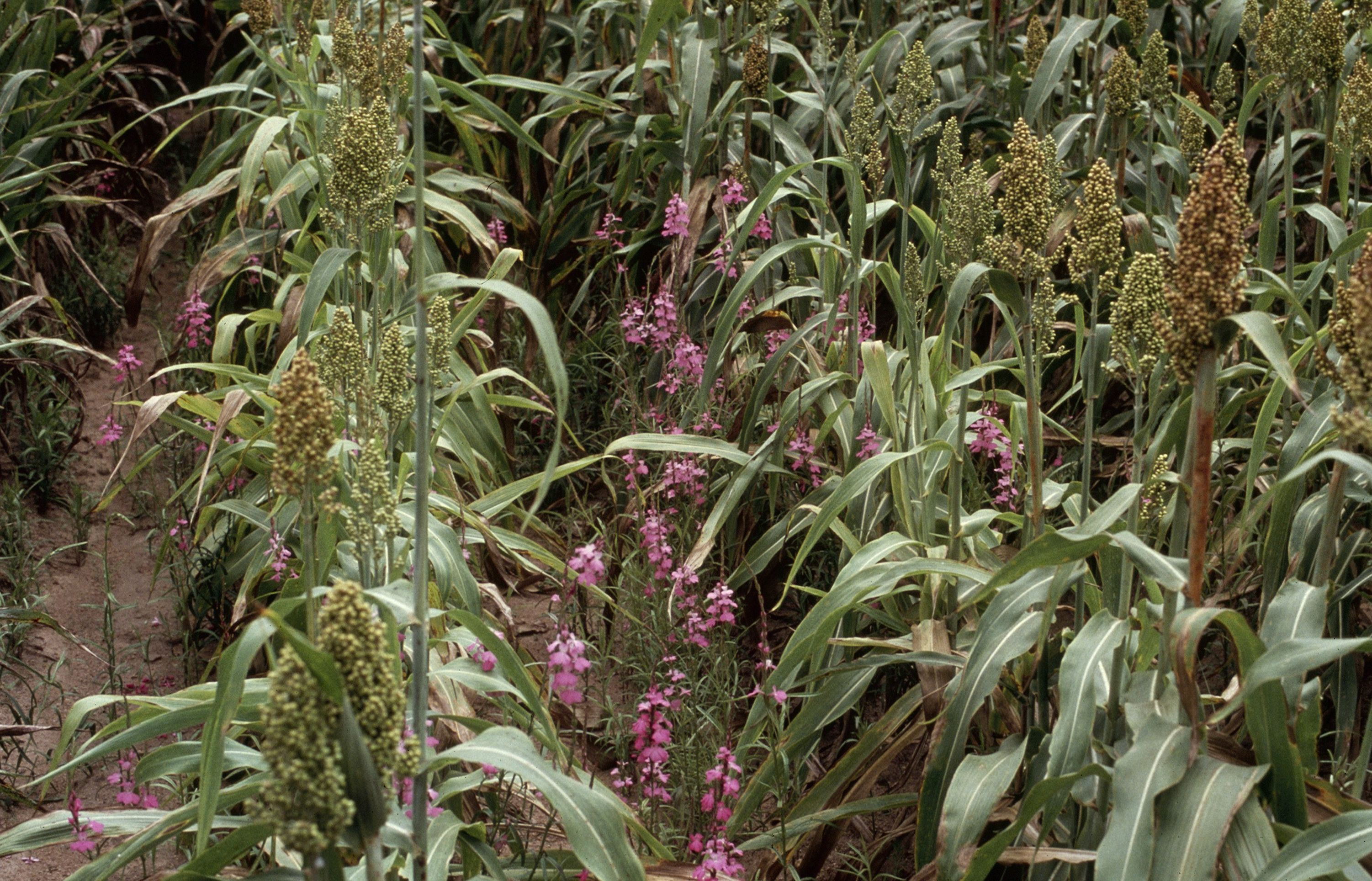 Champ de sorgho commun infesté par Striga hermonthica, mauvaise herbe parasite.